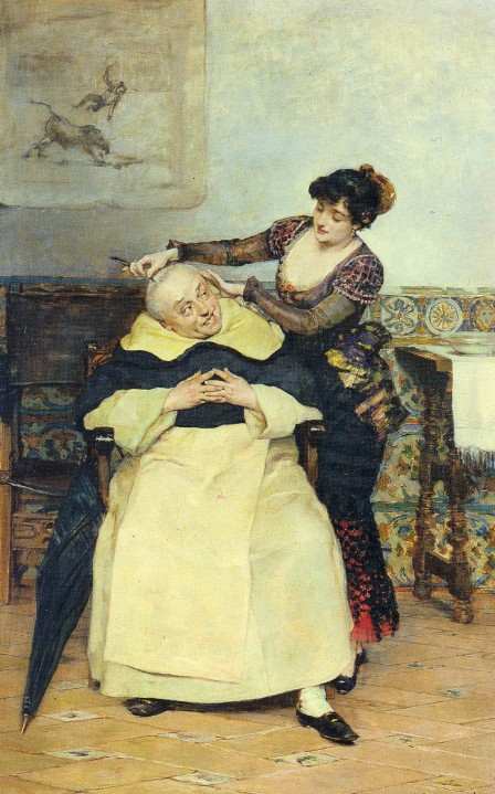 El corte de cabello. [Messerformschnitt]